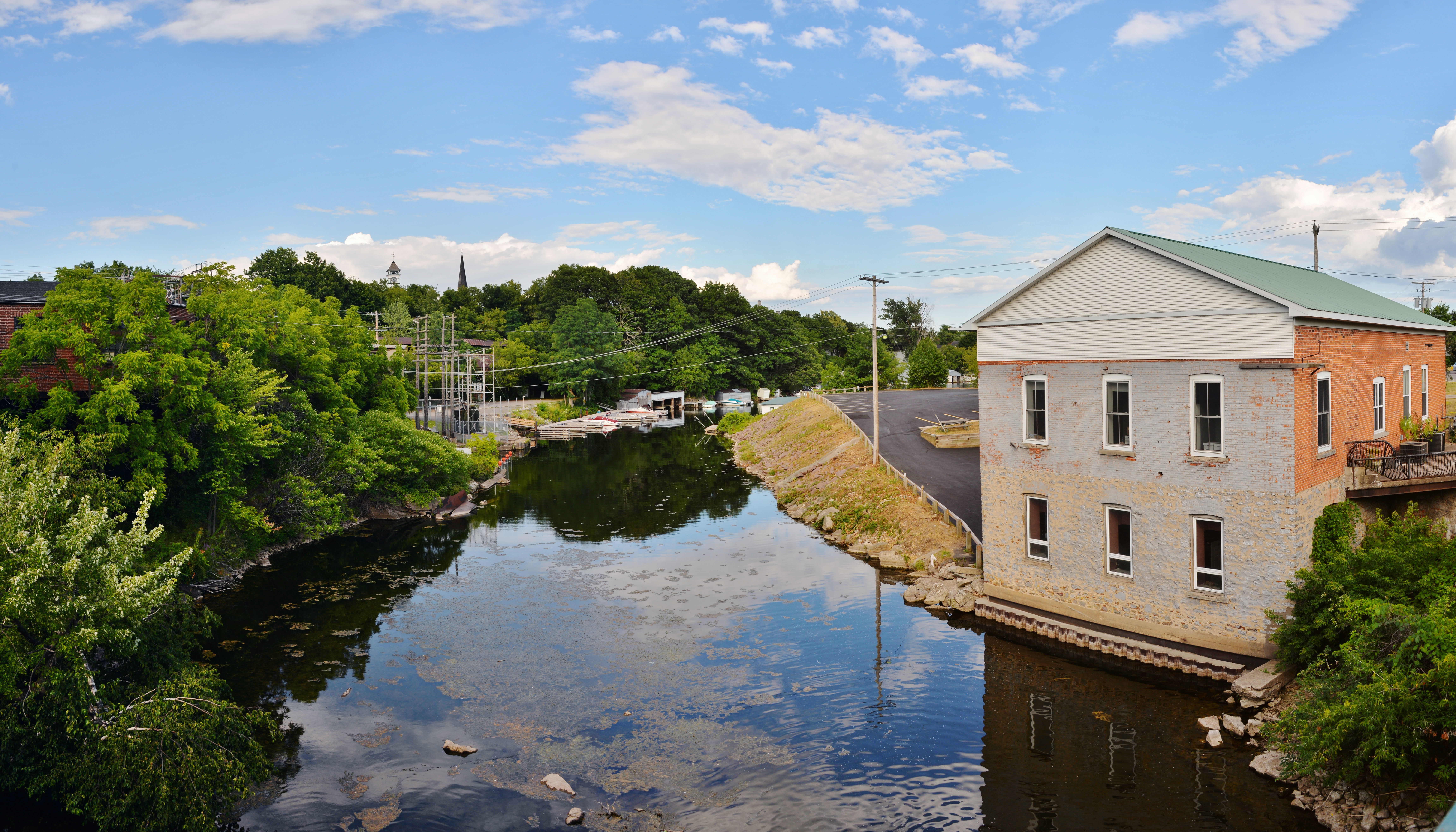 Річка Ґананокве в нижній течії, при впадінні в річку Св. Лаврентія, справа психіатрична клініка м. Ґананокве